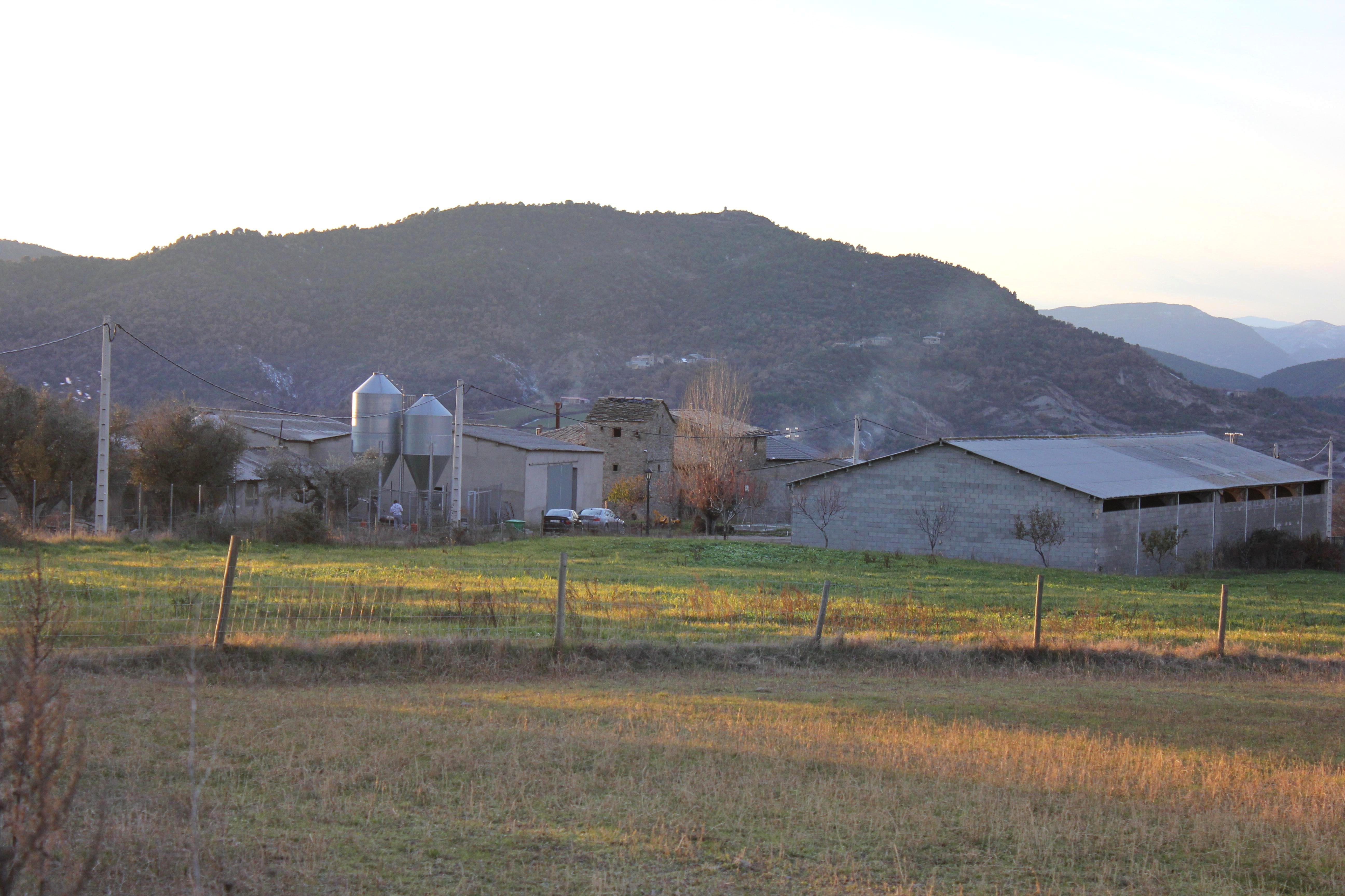 Aragonés: Plano cheneral de O Lumo de Ranyín (A Fueva).